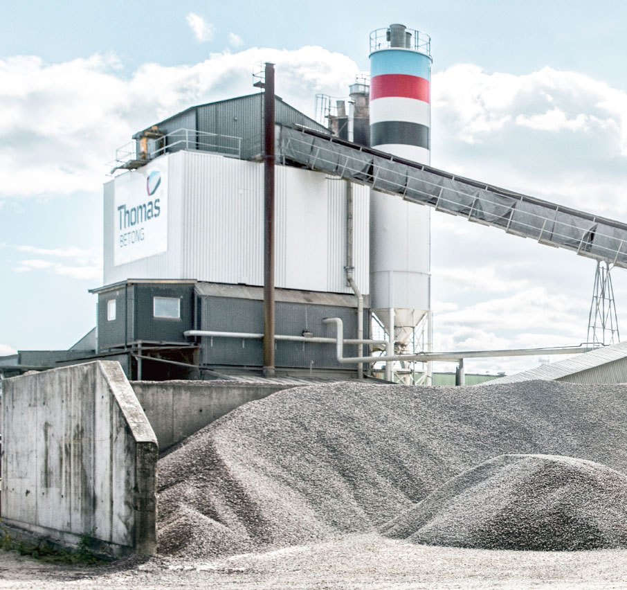 Betongfabrik, Thomas Betong